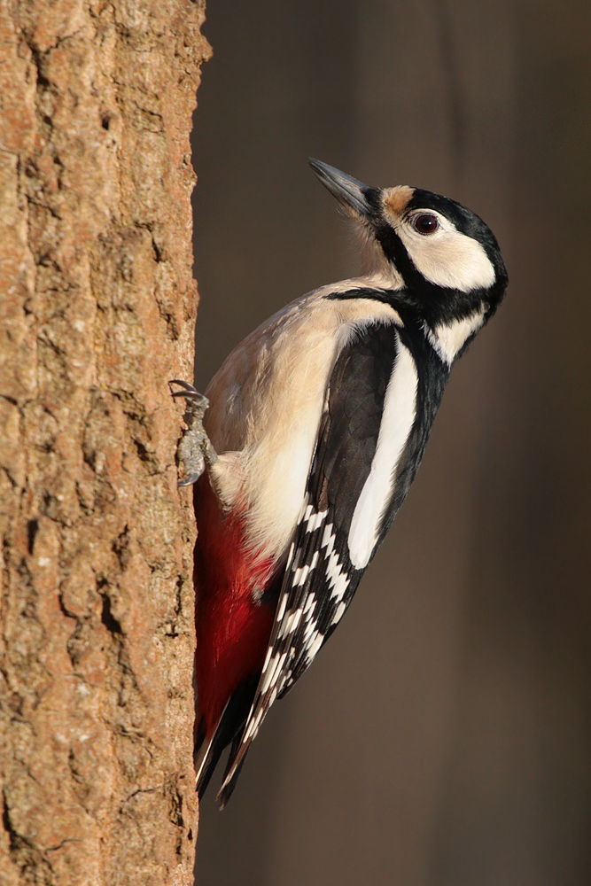 Buntspecht in der Nähe des Ilkerbruchs